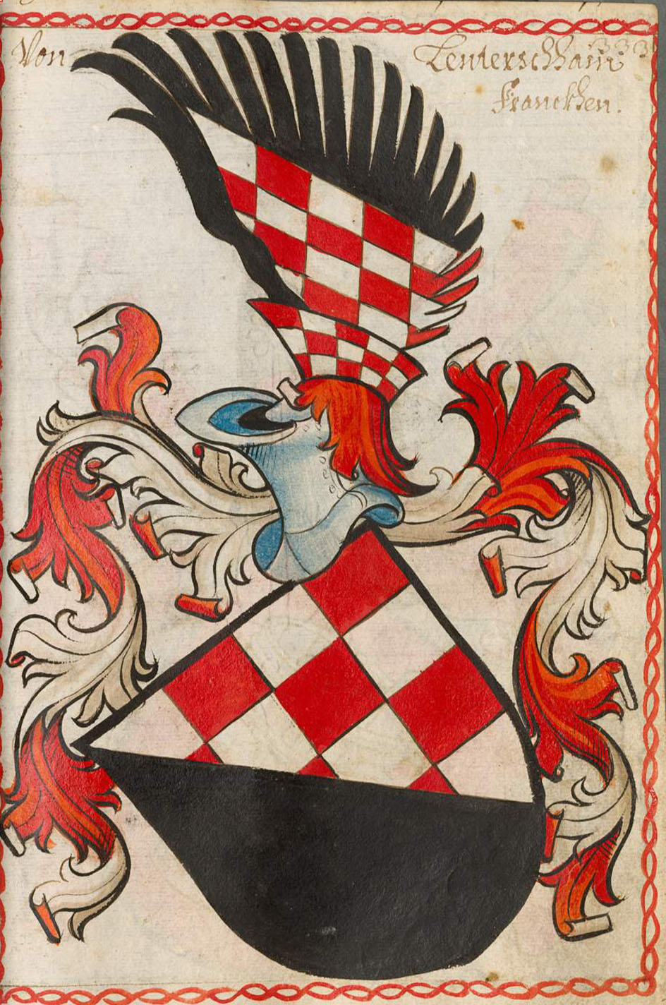 Scheibler'sches Wappenbuch , älterer Teil Lendersheim